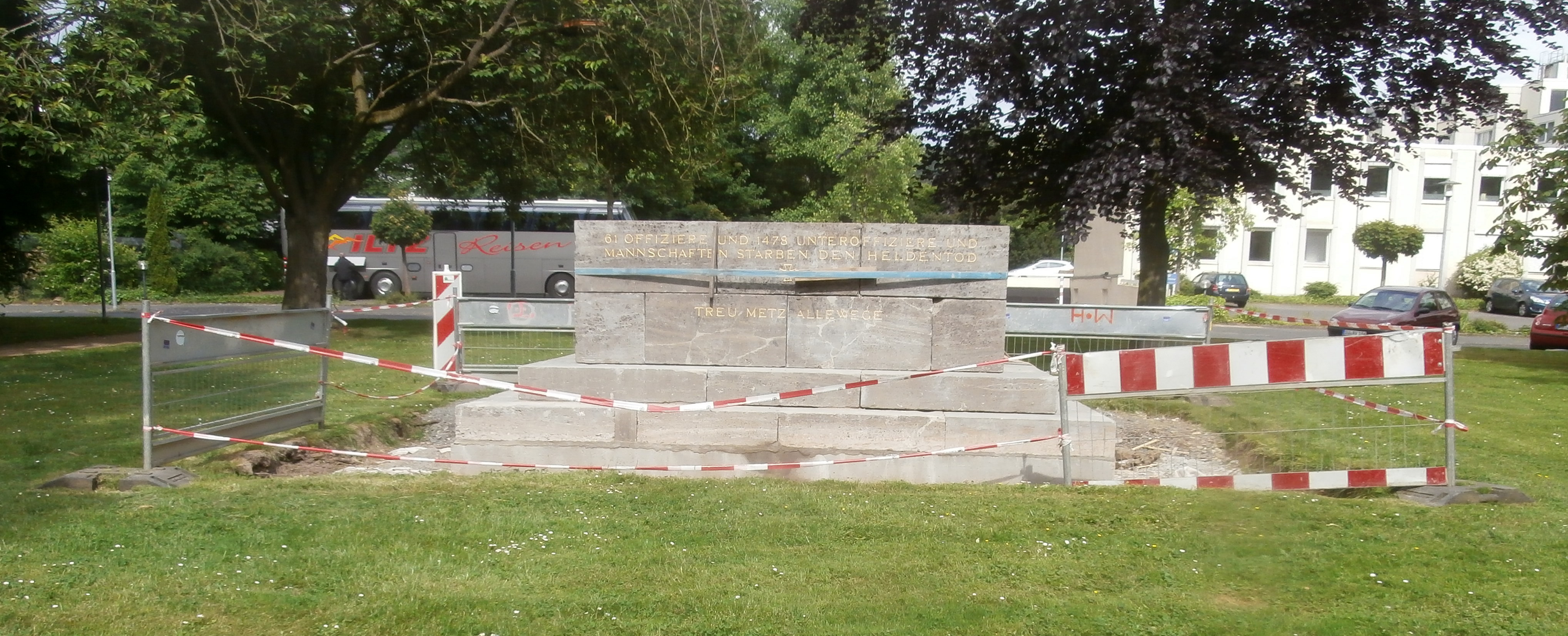 Löwendenkmal, Alexander-von-Humboldt-Straße (Stadtgarten), Bad Honnef: Aufnahme während der Neuaufstellung 2015, noch ohne die Löwenskulptur